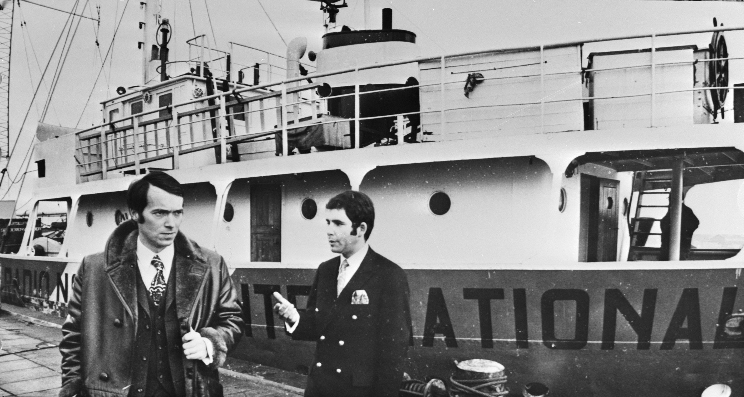 De Zwitserse eigenaars Bollier en Meister voor het schip van Radio Noordzee Internationaal